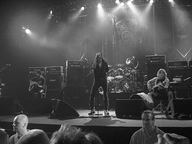 Det här är en manipulerad bild av bandet Motörhead. Den togs under Motörheads spelning på Hovet.